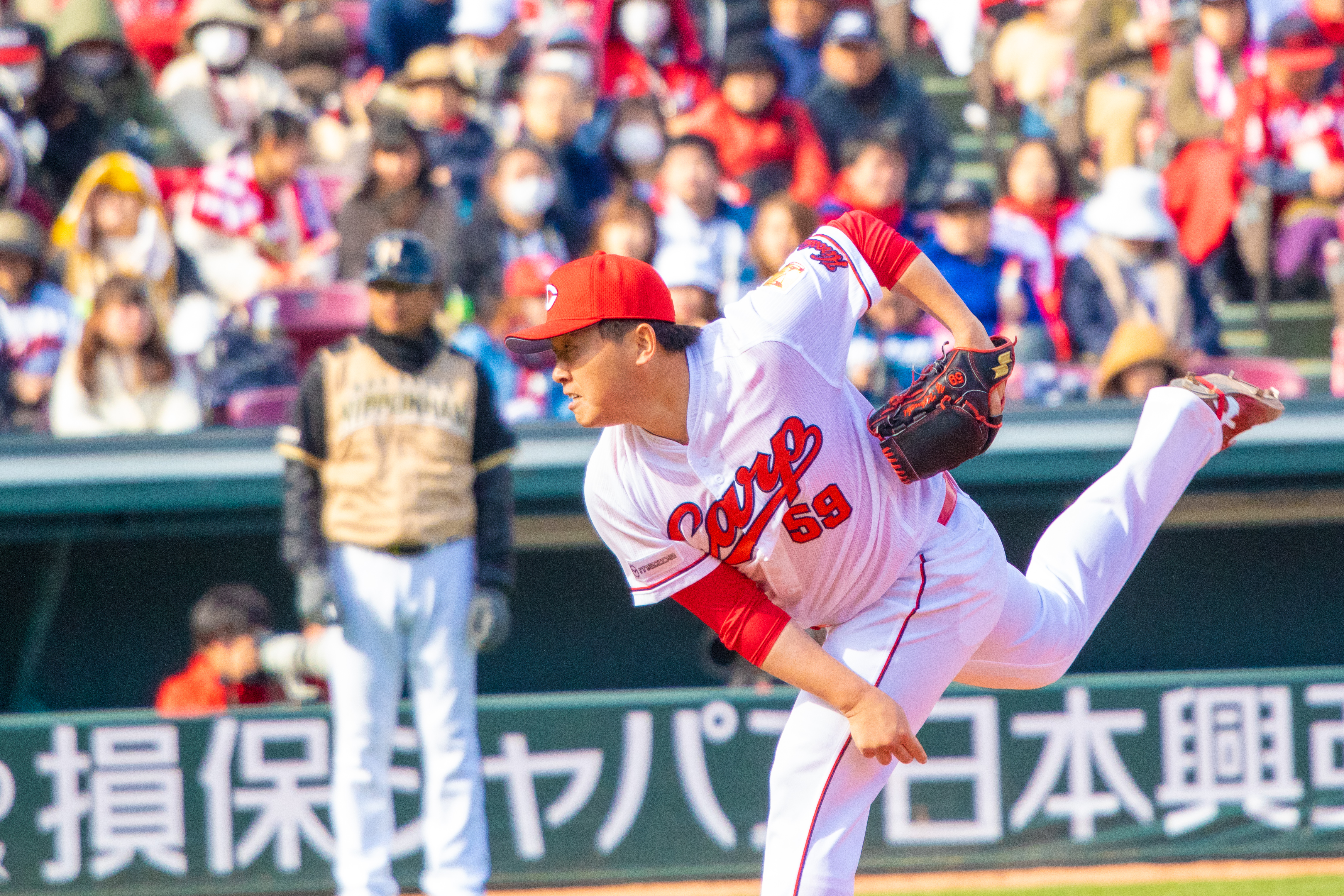 2019/3/13 マツダスタジアム